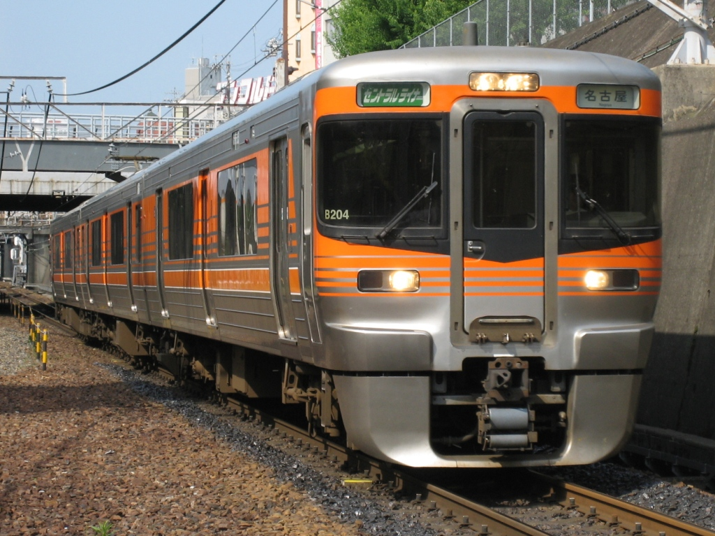 千種駅で継之助が撮影。313系8000番台セントラルライナー。